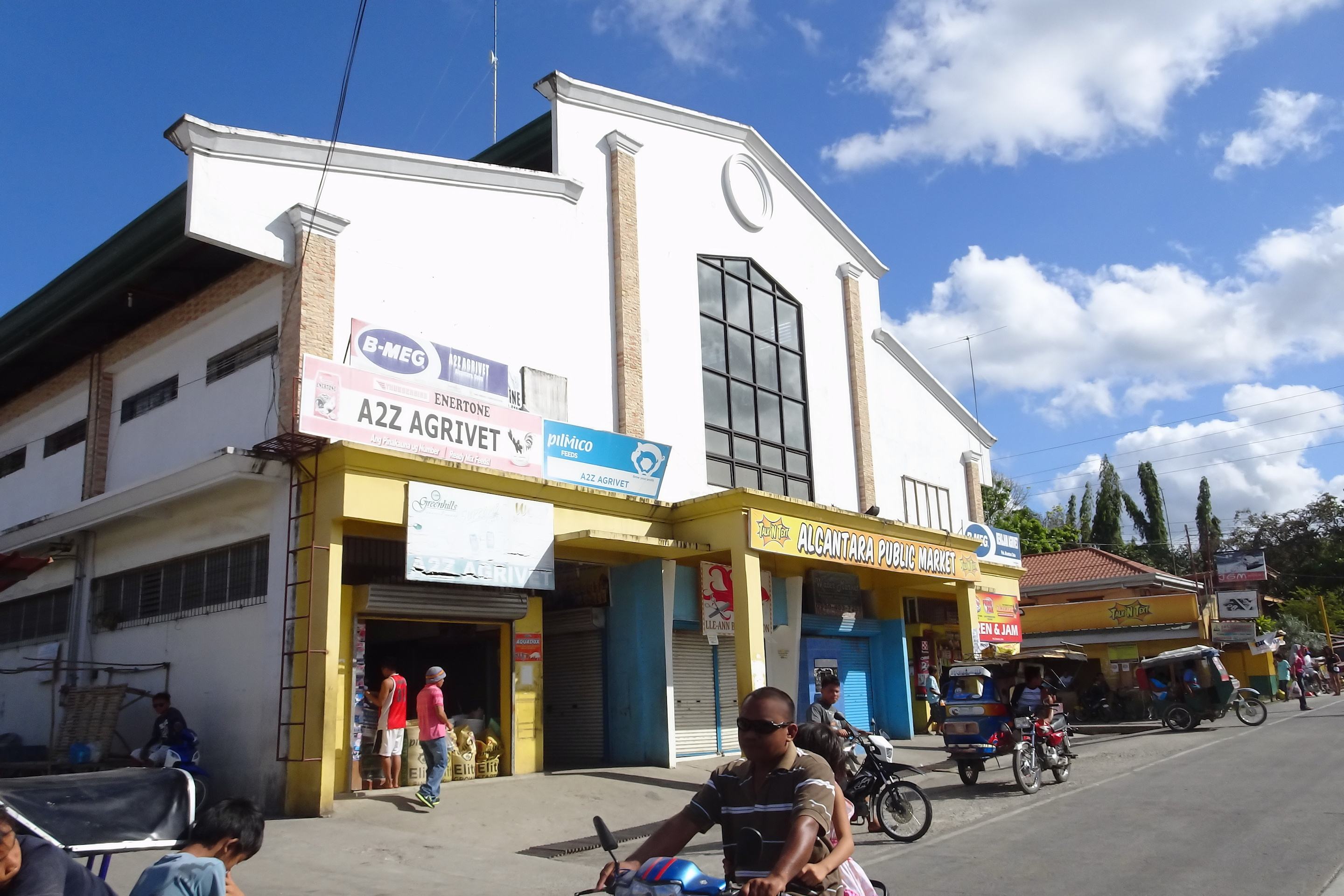 Alcantara, Cebu, Philippines